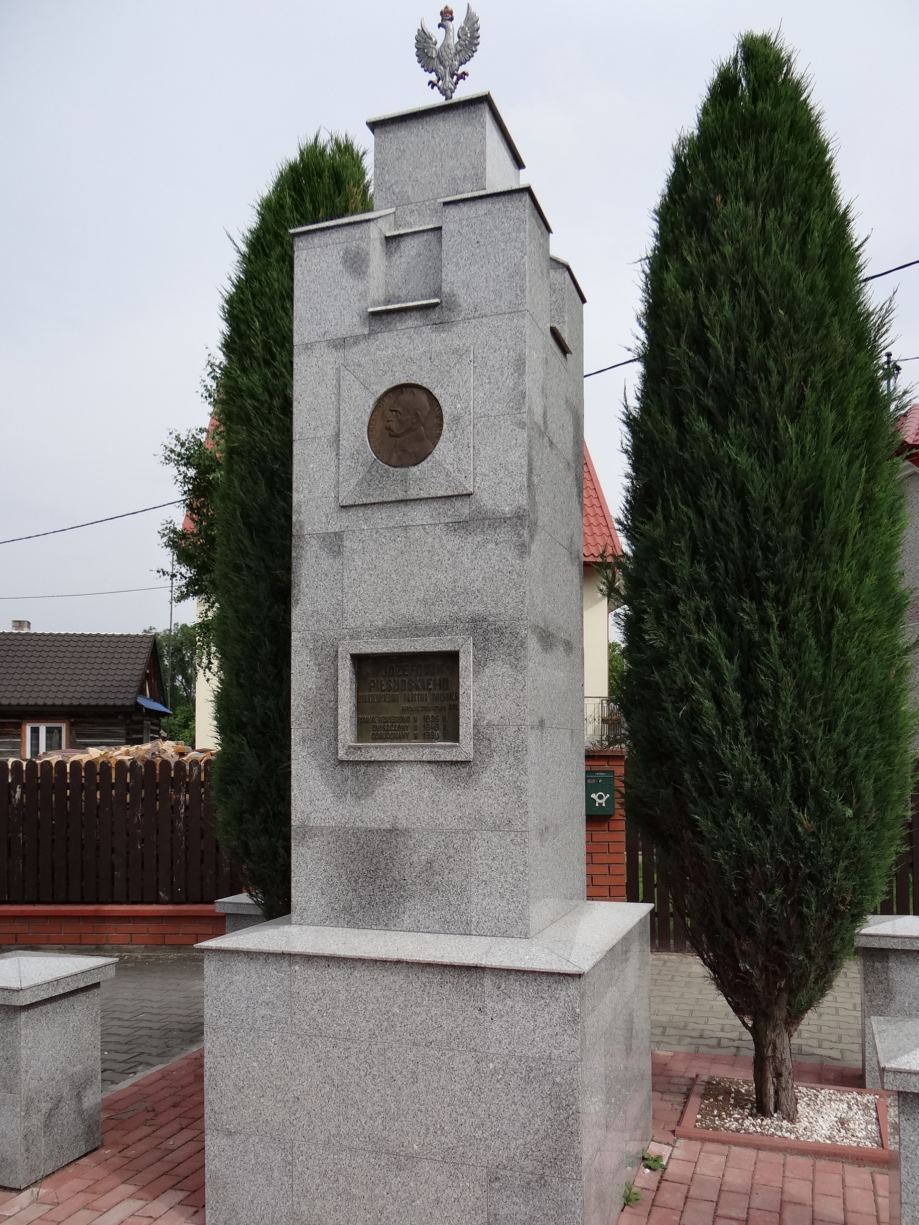 Zdjęcie wykonane w miejscowości Sól, gmina Biłgoraj.